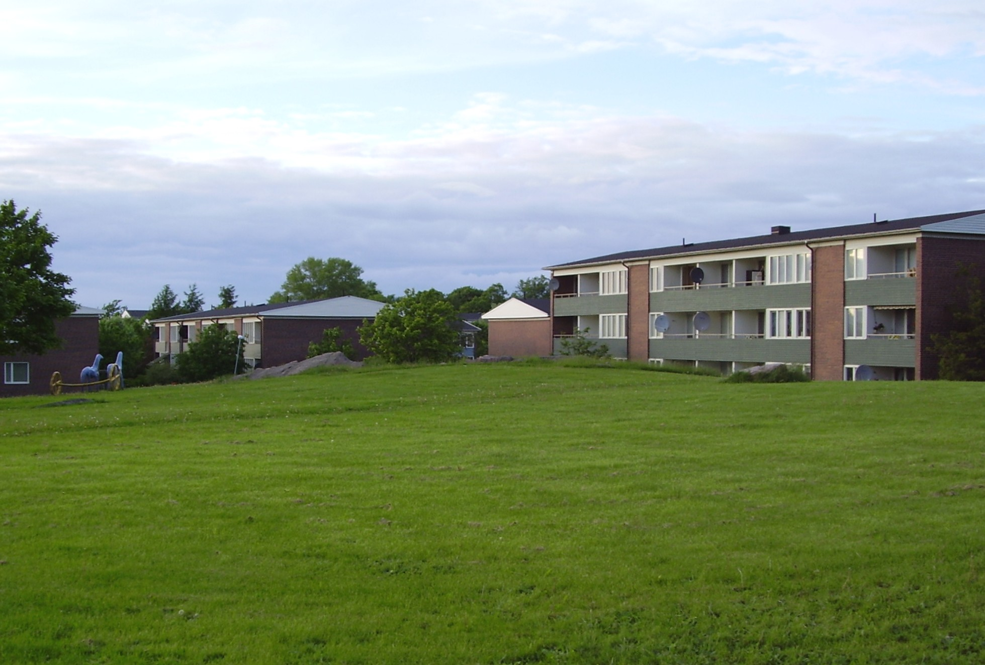 Bild på Skäggetorp Foto:Lavas.